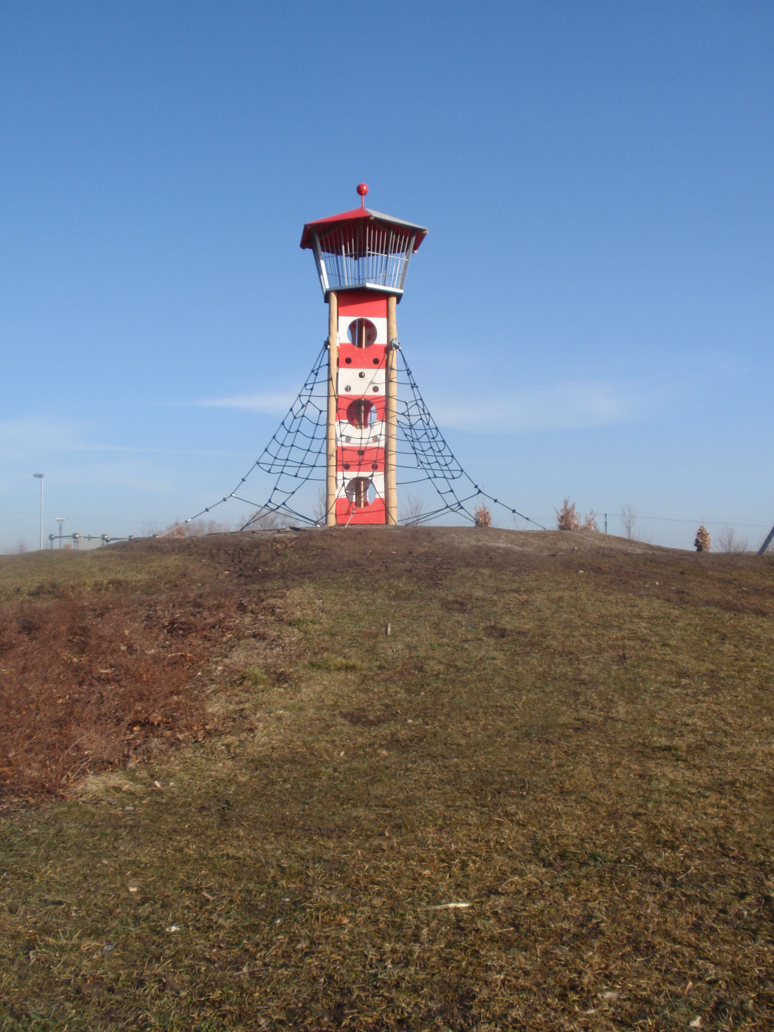 Rozhledna v Dědicích na Jahodovém kopečku (Jahodové hřiště). Dokončena začátkem roku 2019.